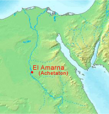 Mapa egyptské archeologické lokality El Amarna (starověké město Achetaton) K úpravě mapy posloužil software [1].